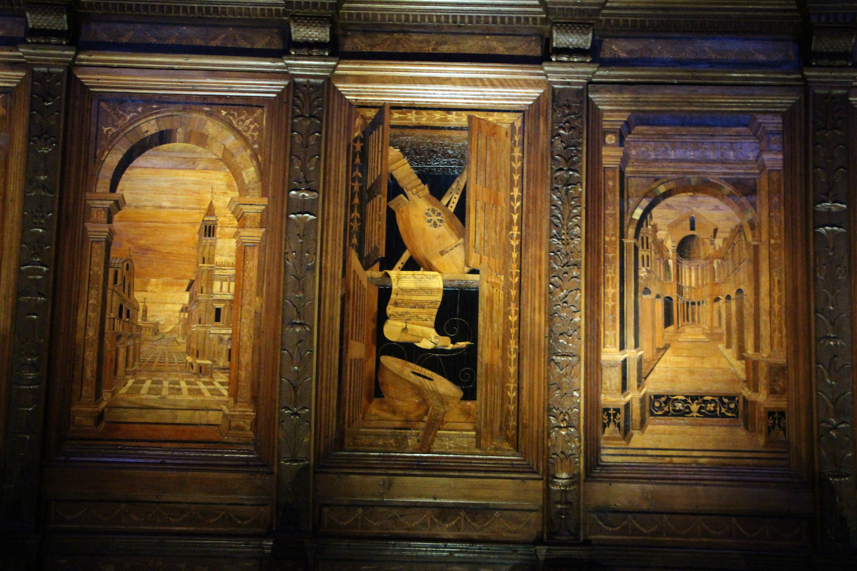 Abbazia di Monte Oliveto Maggiore